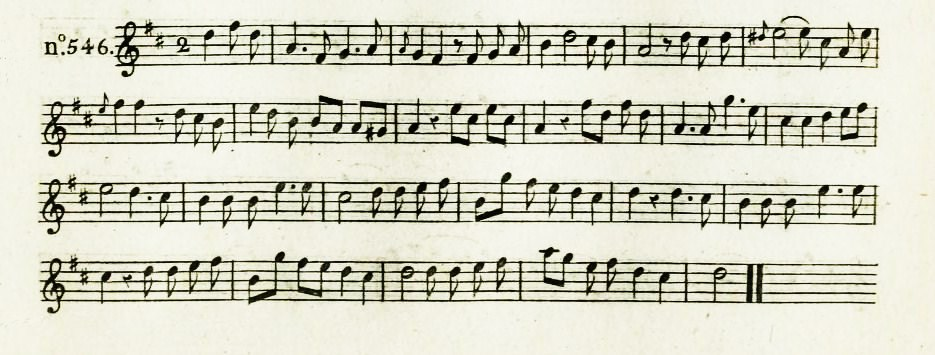 Un air de la clé du caveau. Il a notamment été employé par Victor Hugo pour un couplet dédié à la pêche. Réf. Clé du Caveau